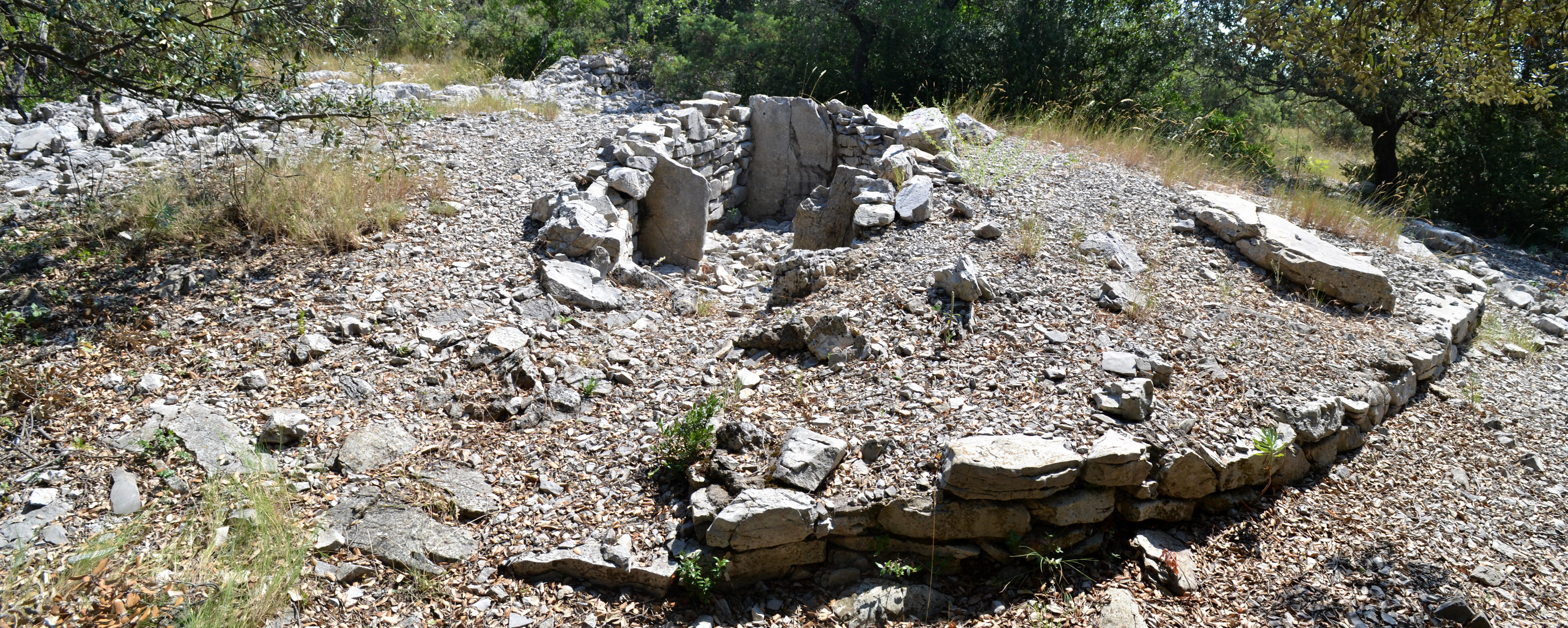 Dolmen de Cambous à Viols-en-Laval (34).